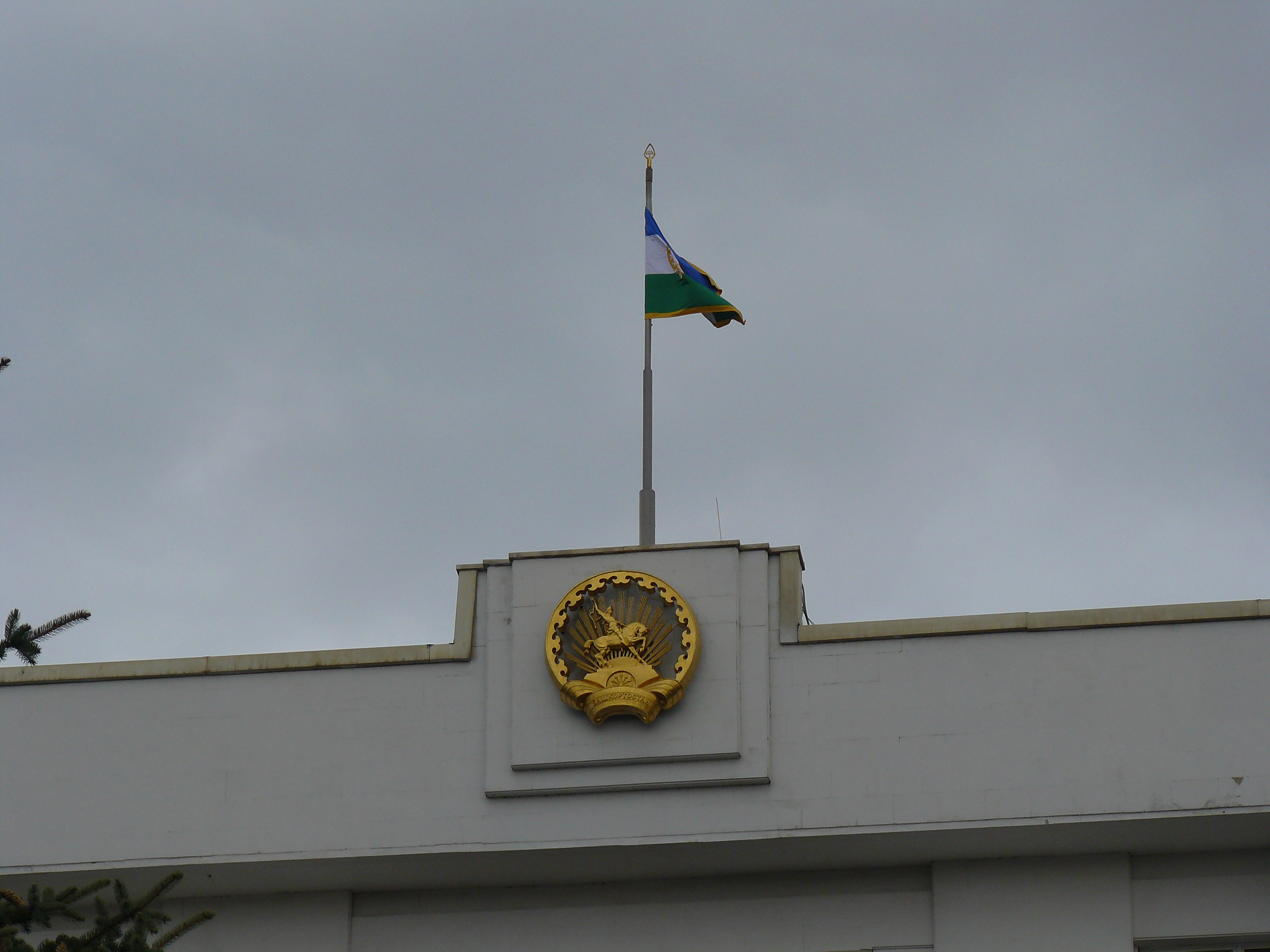 Вікі-сабантуй, Уфа, 2015